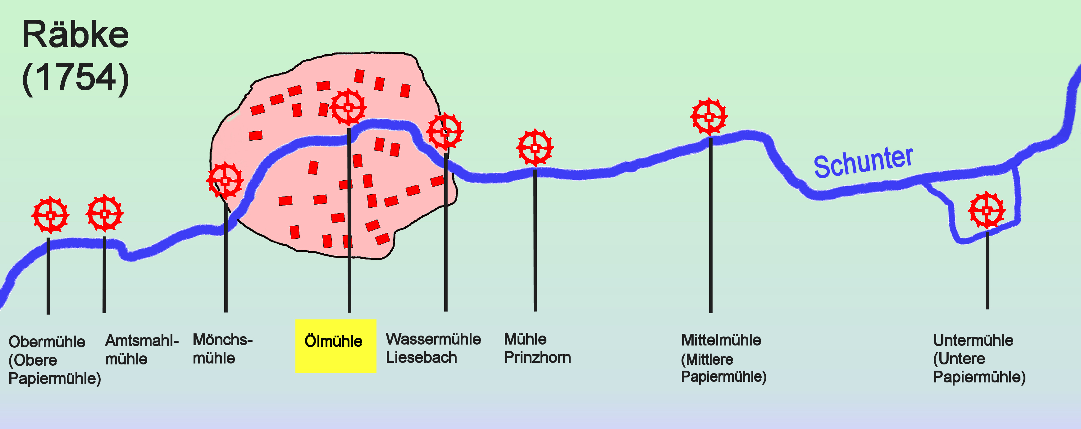 Ölmühle, Zeichnung nach der Braunschweigischen General-Landesvermessung von 1754